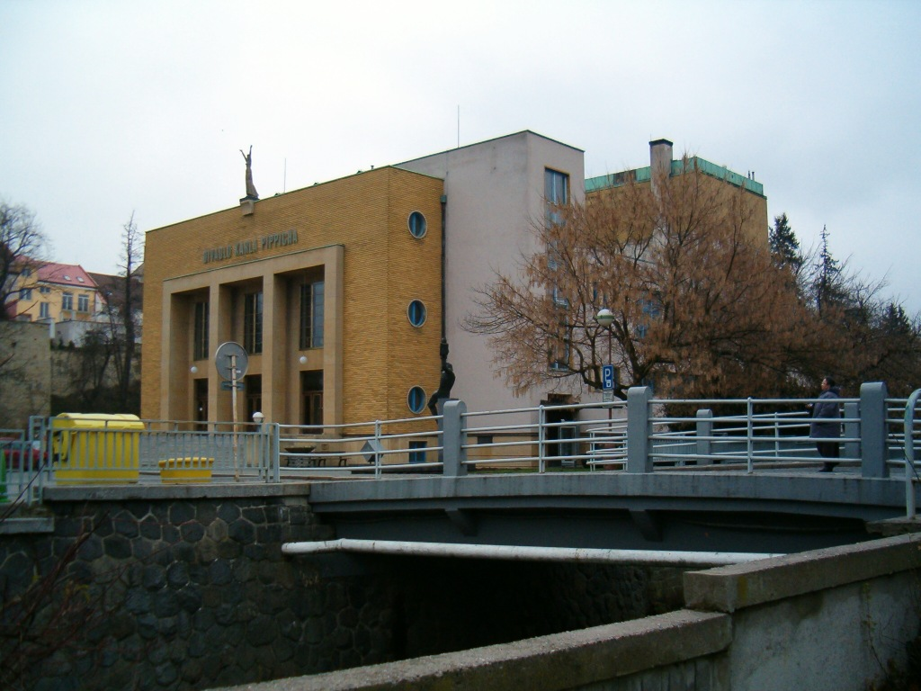 Divadlo Karla Pippicha